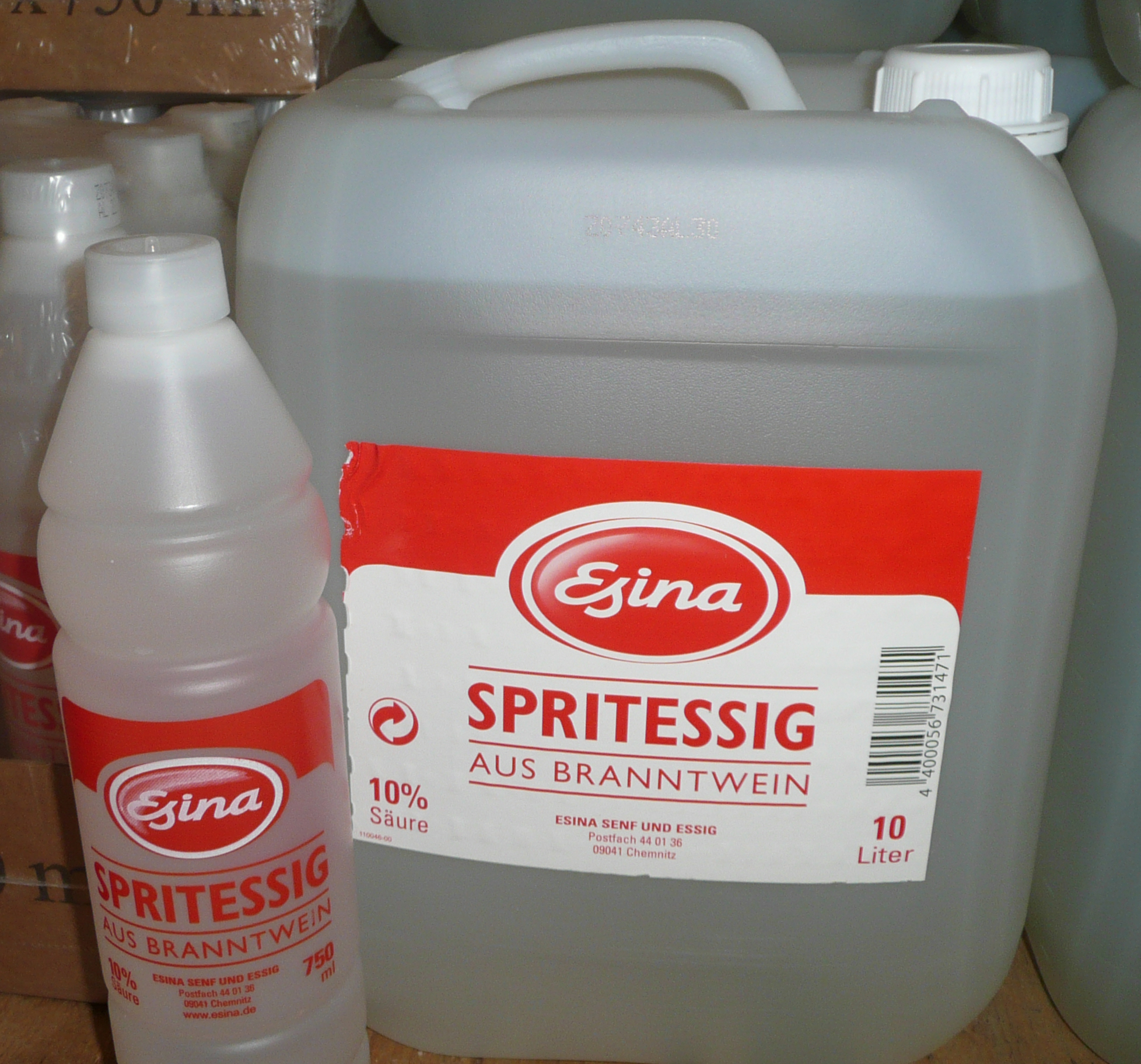 Spritessig Esina